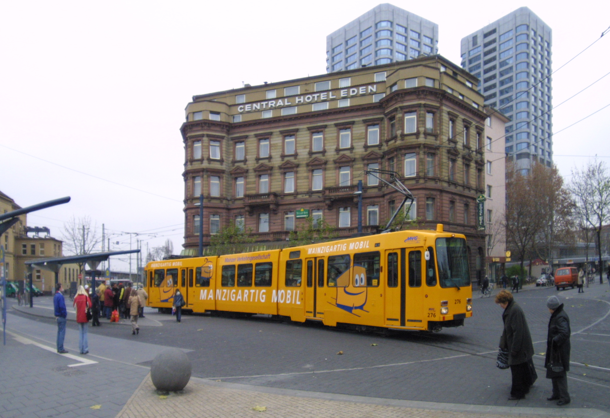 MVG-Straßenbahn 276 an der Haltestelle Hauptbahnhof, Mainz